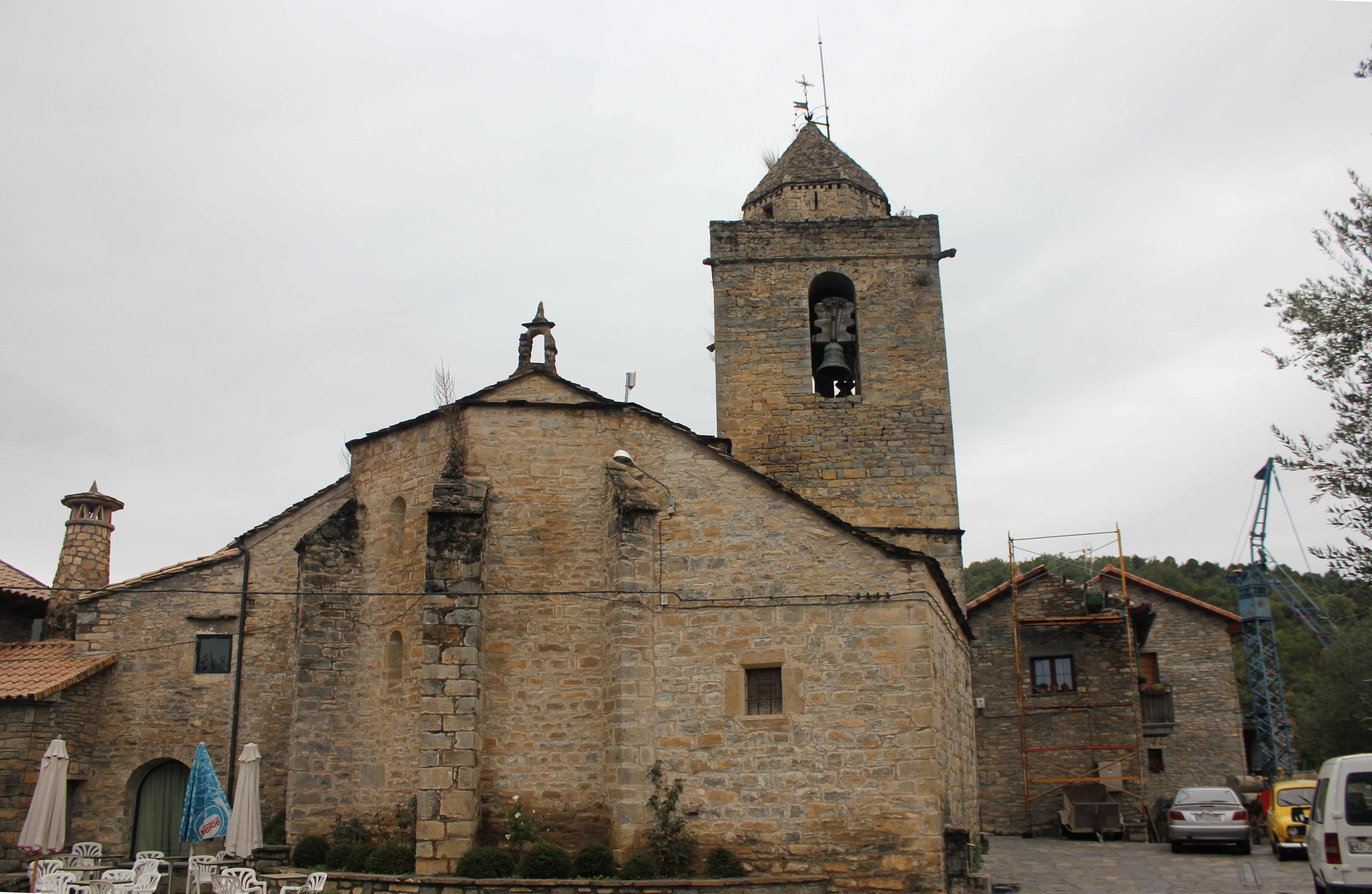 Aragonés: A ilesia de Sieste.